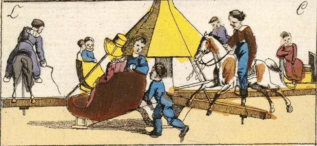 Karussell